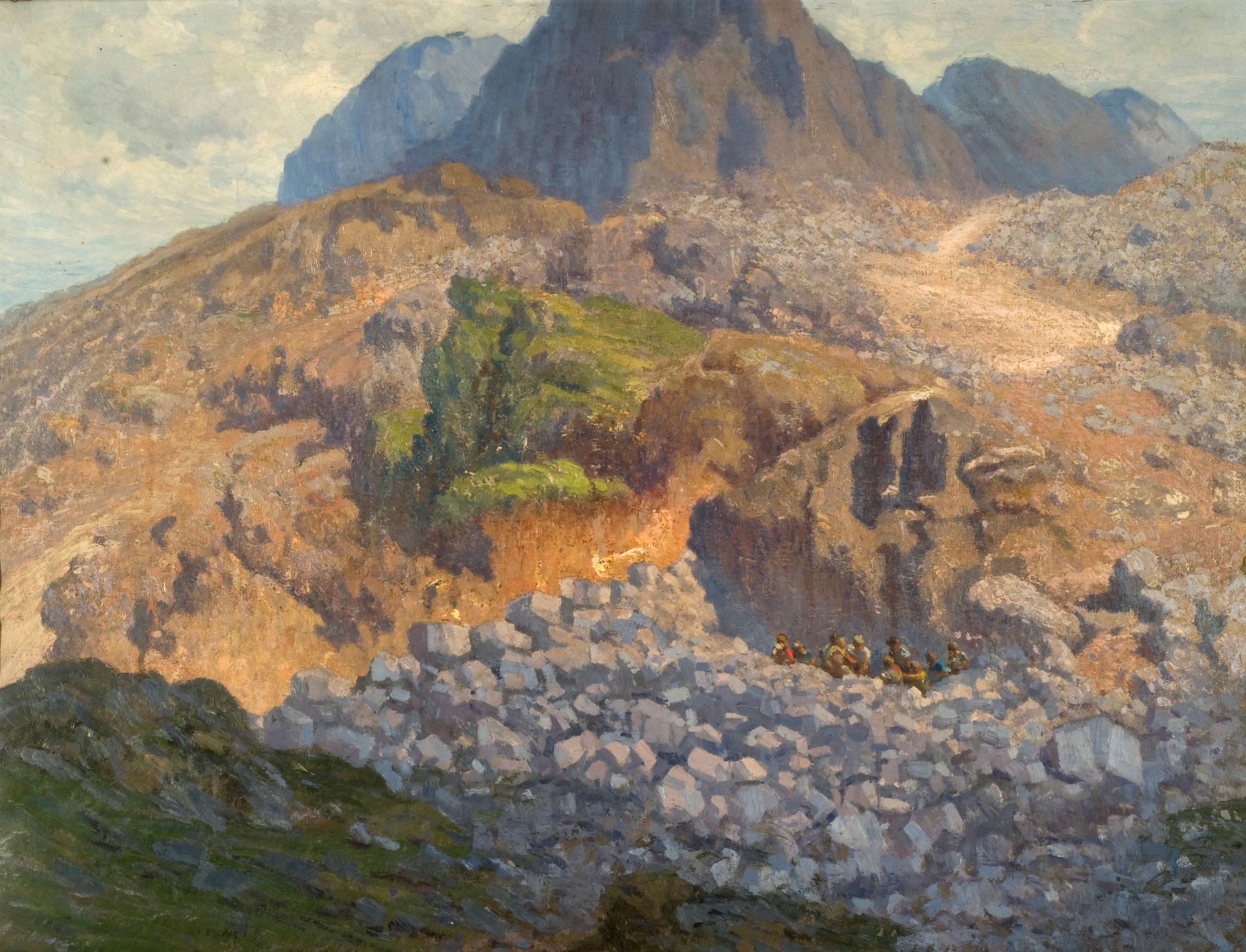 Pío Collivadino, Paisaje de Tandil. Siglo XIX. 70 x 92 cm, óleo sobre tela. Inv. 6692.